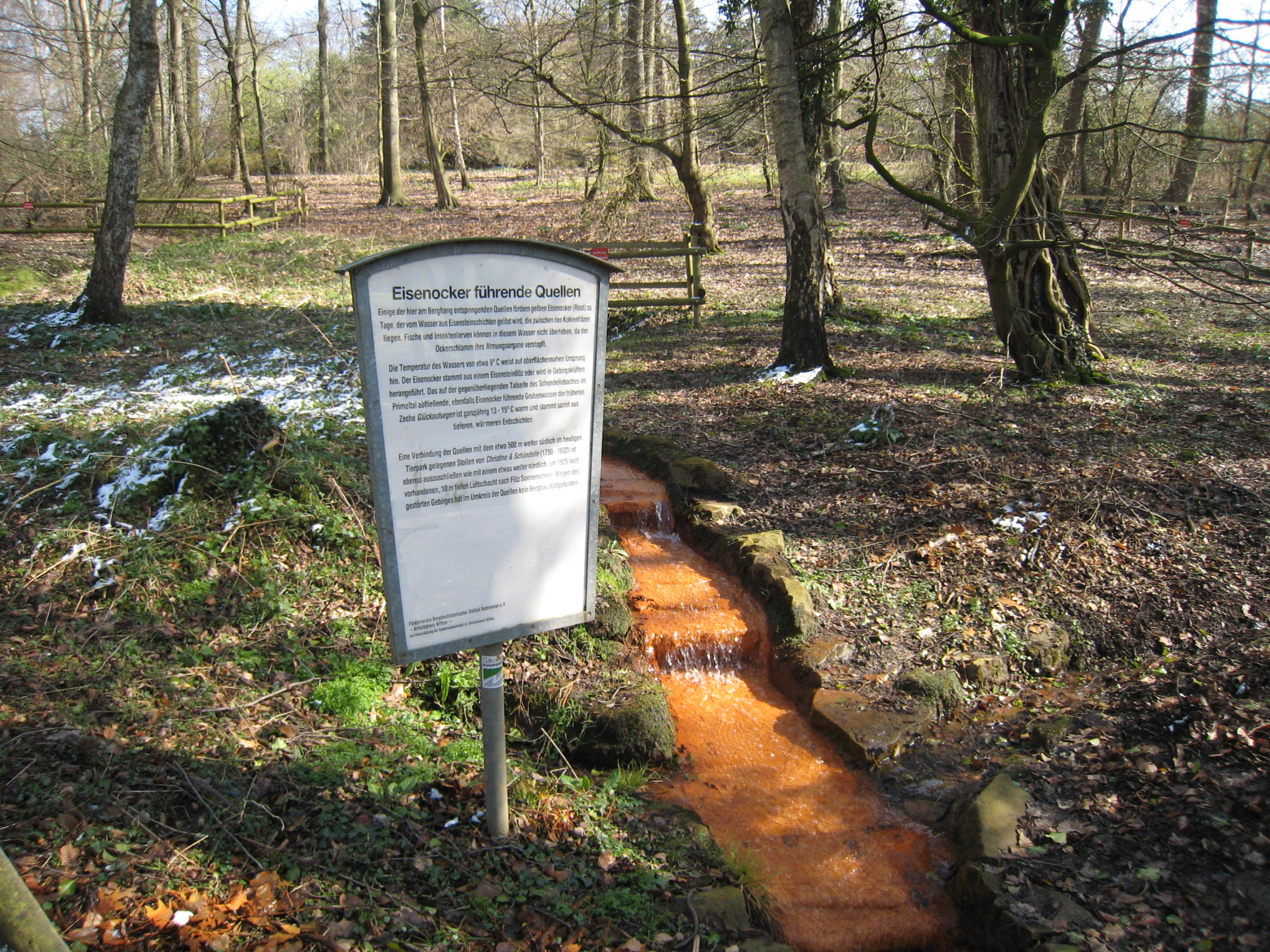 Eisenocker führende Quelle (namenloser Bachlauf) im Osten des Dortmunder Rombergparks